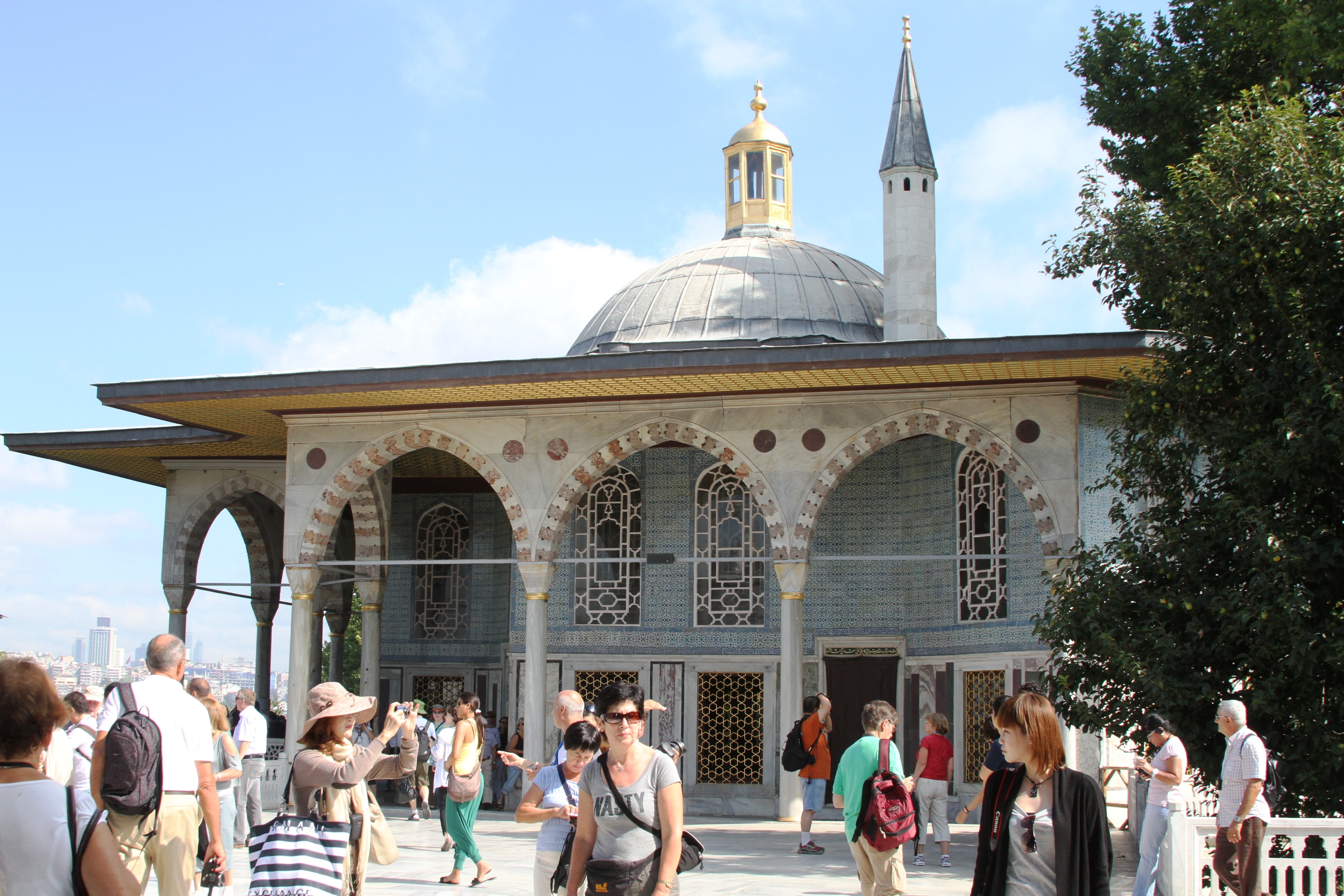 Quiosque de Bagdá no Palácio de Topkapi